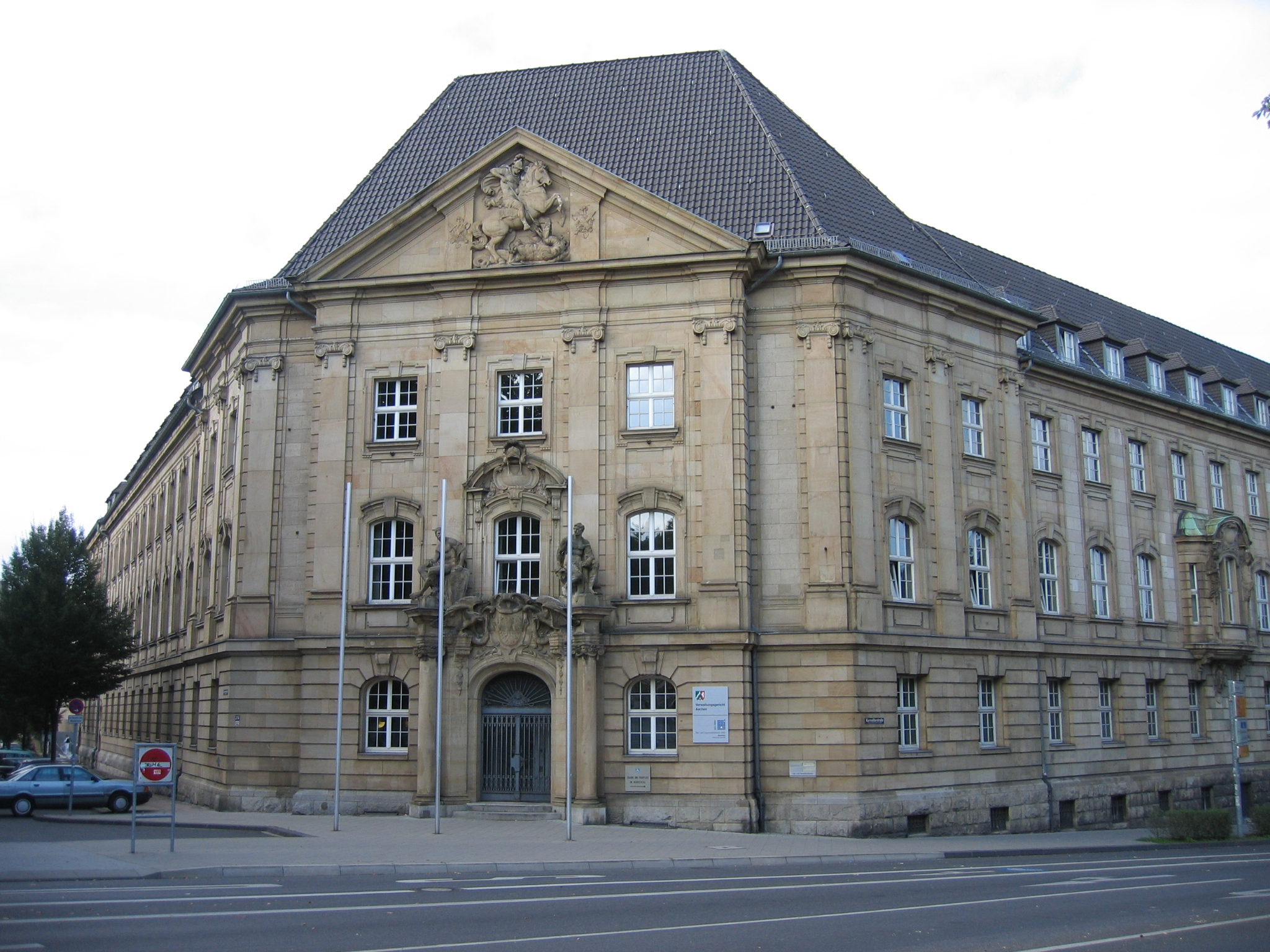 Verwaltungsgericht Aachen